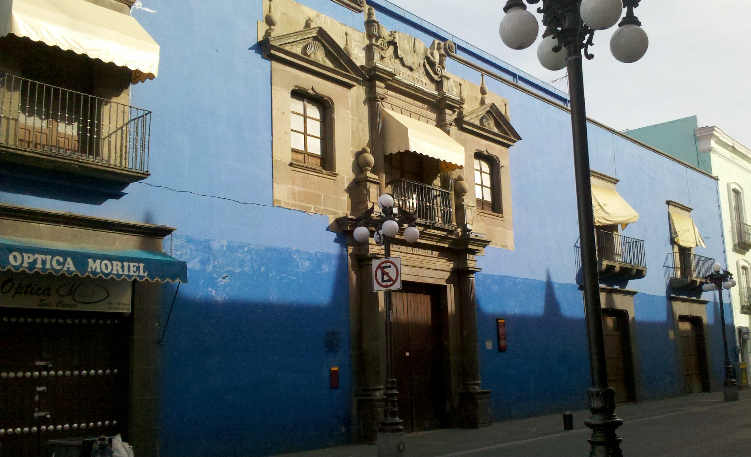 Casa del Deán, Puebla, México. Siglo XVI. 16 de septiembre 505.